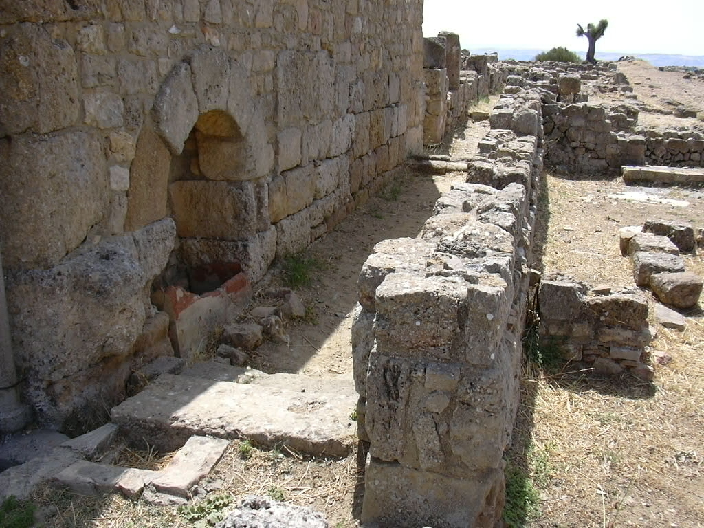 Morgantina_Sicilia: quartiere ovest, Casa della cisterna ad arco, l'arco